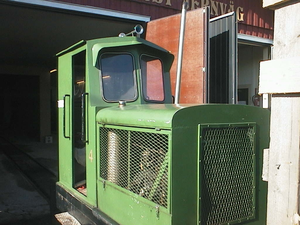 KMN-dieselveturi Kovjoella